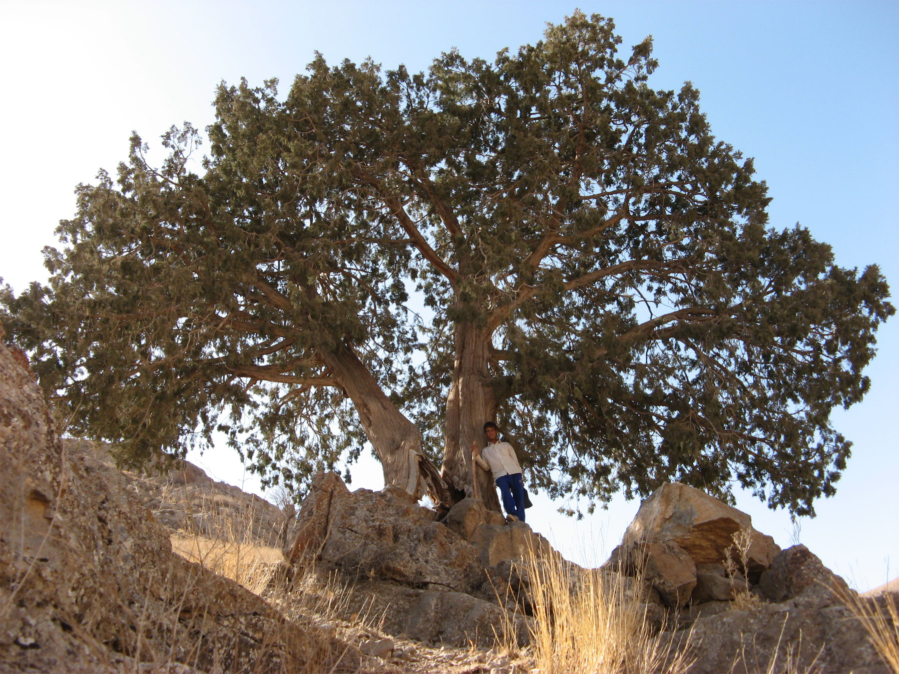 درخت سرو کوهی یا به ترکی آرچه واقع در شمال روستای زالی که هرساله از روستاهای همجوار جهت برآورد شدن آرزوها به کناردرخت رفته و پارچه به آن می بندند